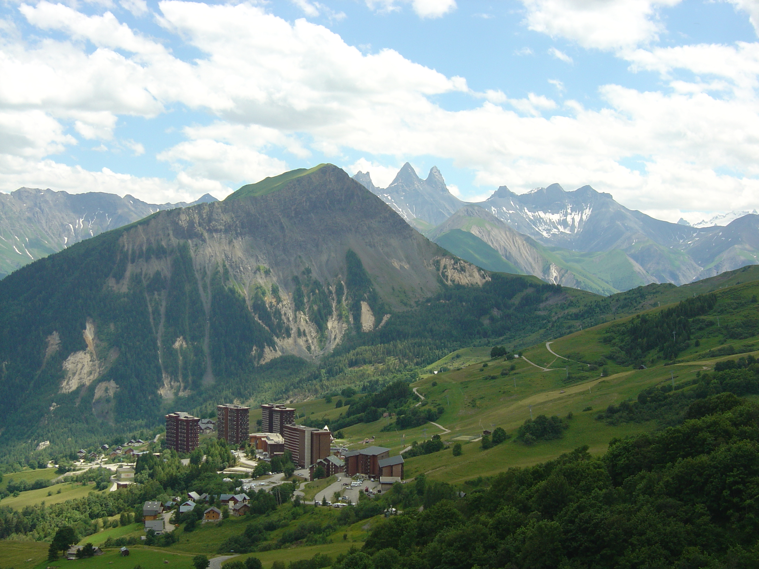 Vue générale de la station du Corbier